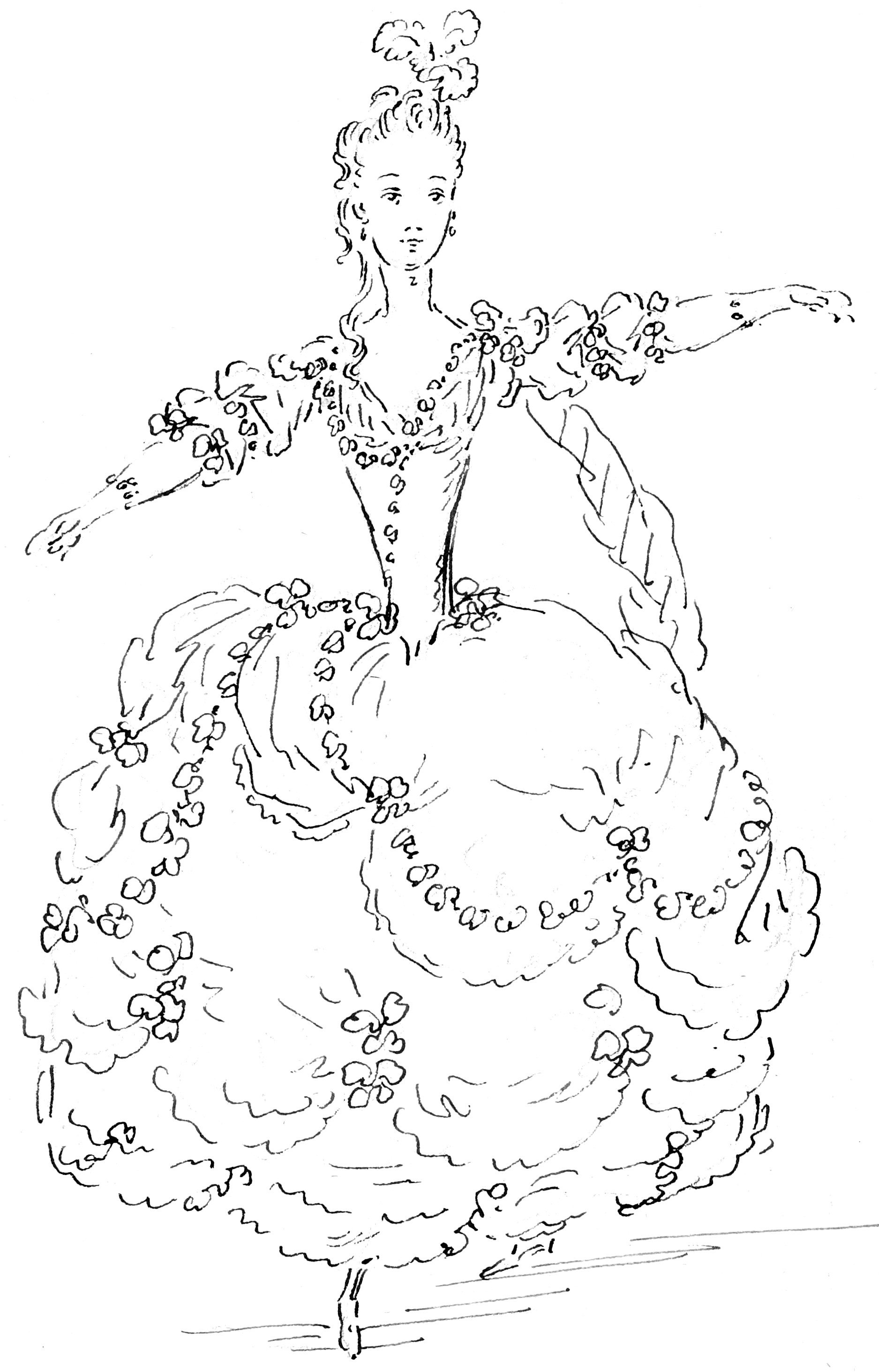 Louis-René Boquet (1717–1814): Kostümentwurf für die Ballerina Anna Heinel (1753–1803) als Genius in der Opéra-ballet "Zémire et Azor" (1771) von André-Ernest-Modeste Grétry (1741–1813). Bibliothèque nationale de France. Ausschnitt.